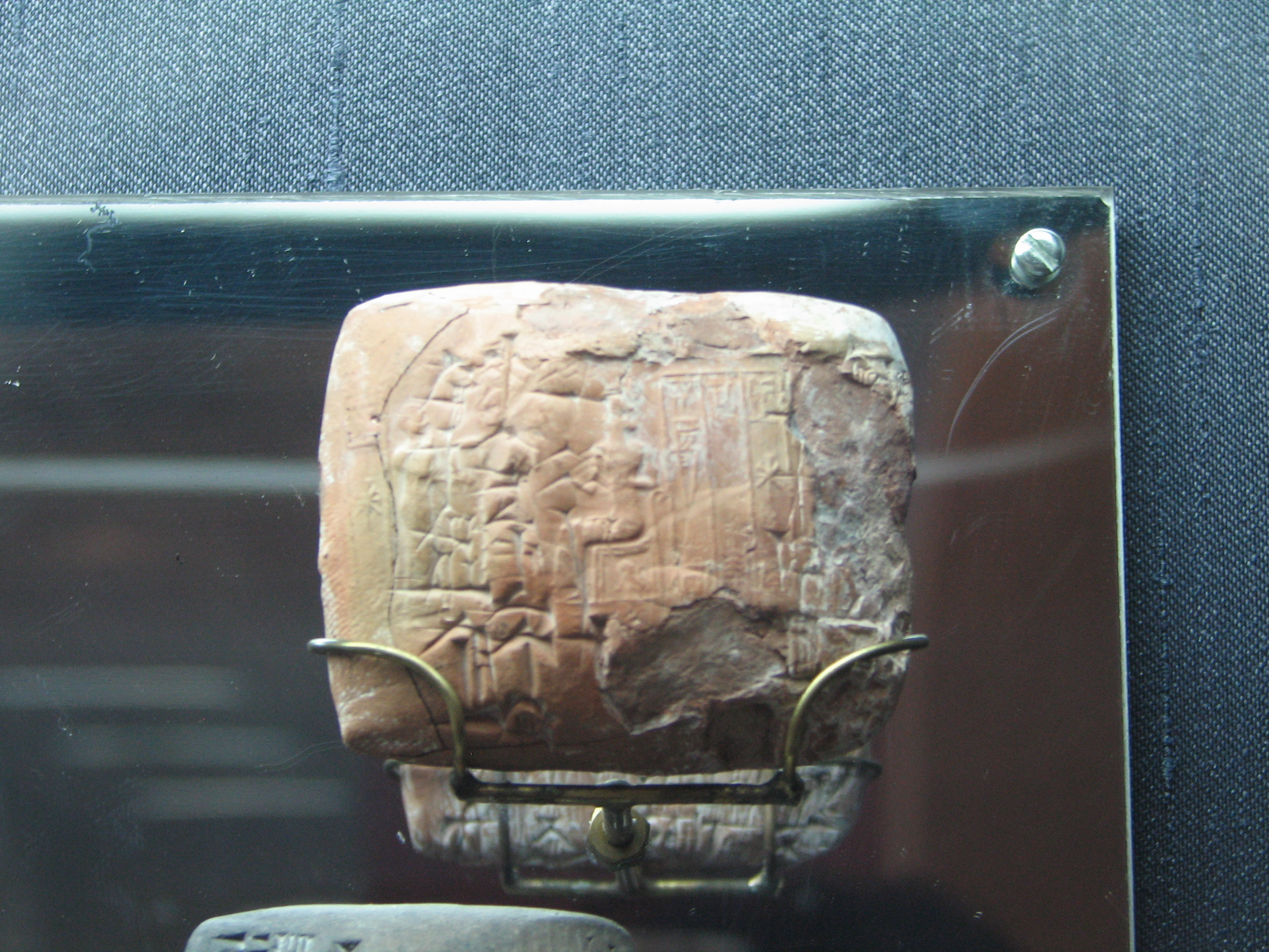 Dagon Museum, Downtown, Haifa, Israel The Museum is dedicated to the history of grain products מוזיאון דגון בעיר התחתית בחיפה שוכן במבנה המשרדים של ממגורות דגון. המוזיאון מוקדש לתולדות הדגן ומוצריו, וכלל ממצאים ארכאולוגים הקשורים בנושא וכן דגמים של מתקנים שונים בהם משתמשים בממגורות דגון לוח חרס עם כתב יתדות המתאר מסחר תמורת דגנים, מחרס. התקופה השומרית, מאור ימי שלטונם של שולגי שו-סין ואמר סין